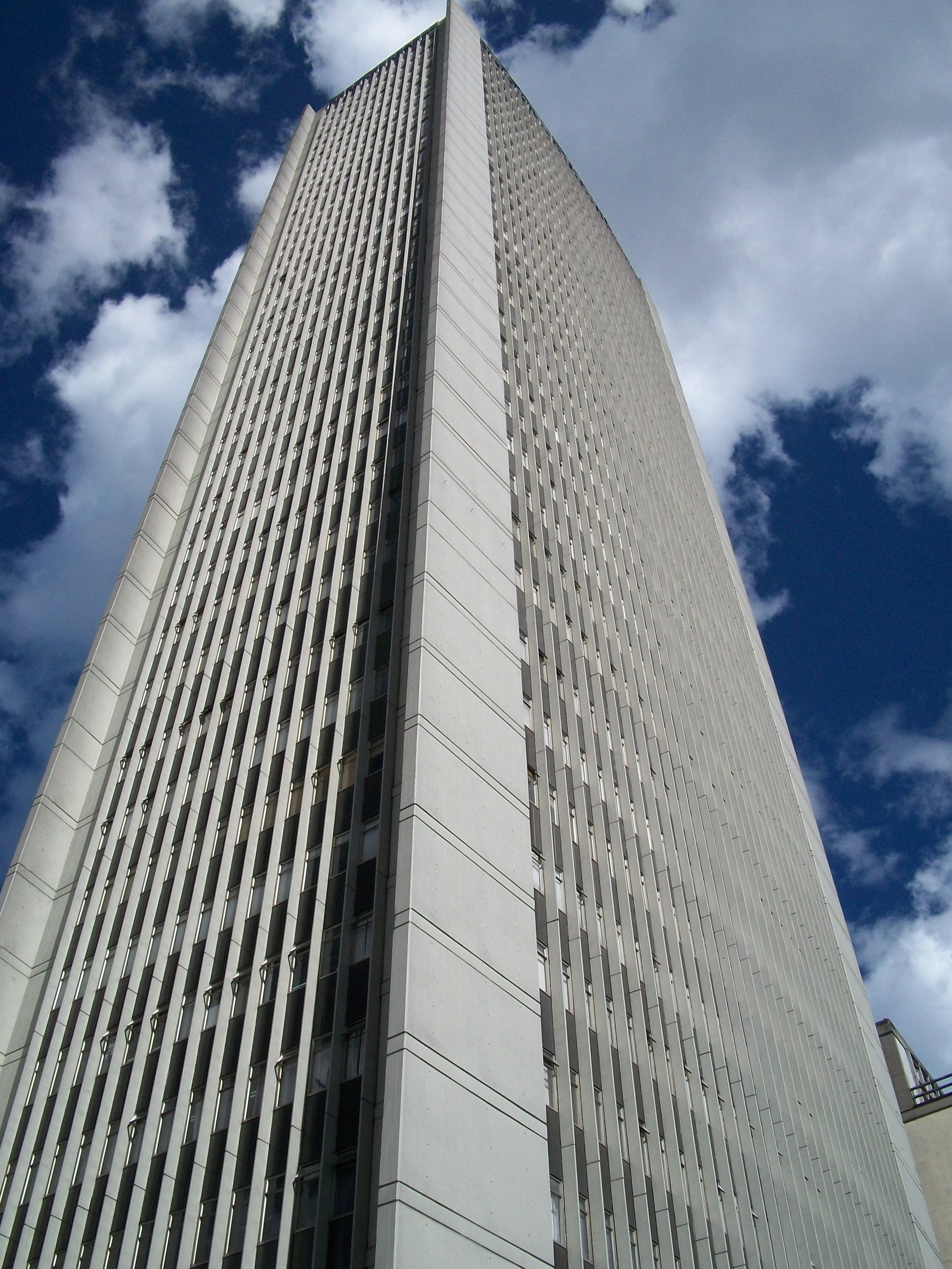 Costado suroccidental del edificio Avianca, Bogotá.